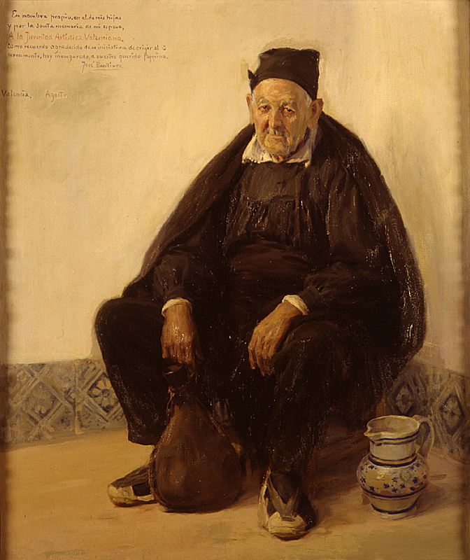 Villar del Arzobispo (hacia 1919). A sus pies una bota de vino y una jarra de loza de Villar del Arzobispo.